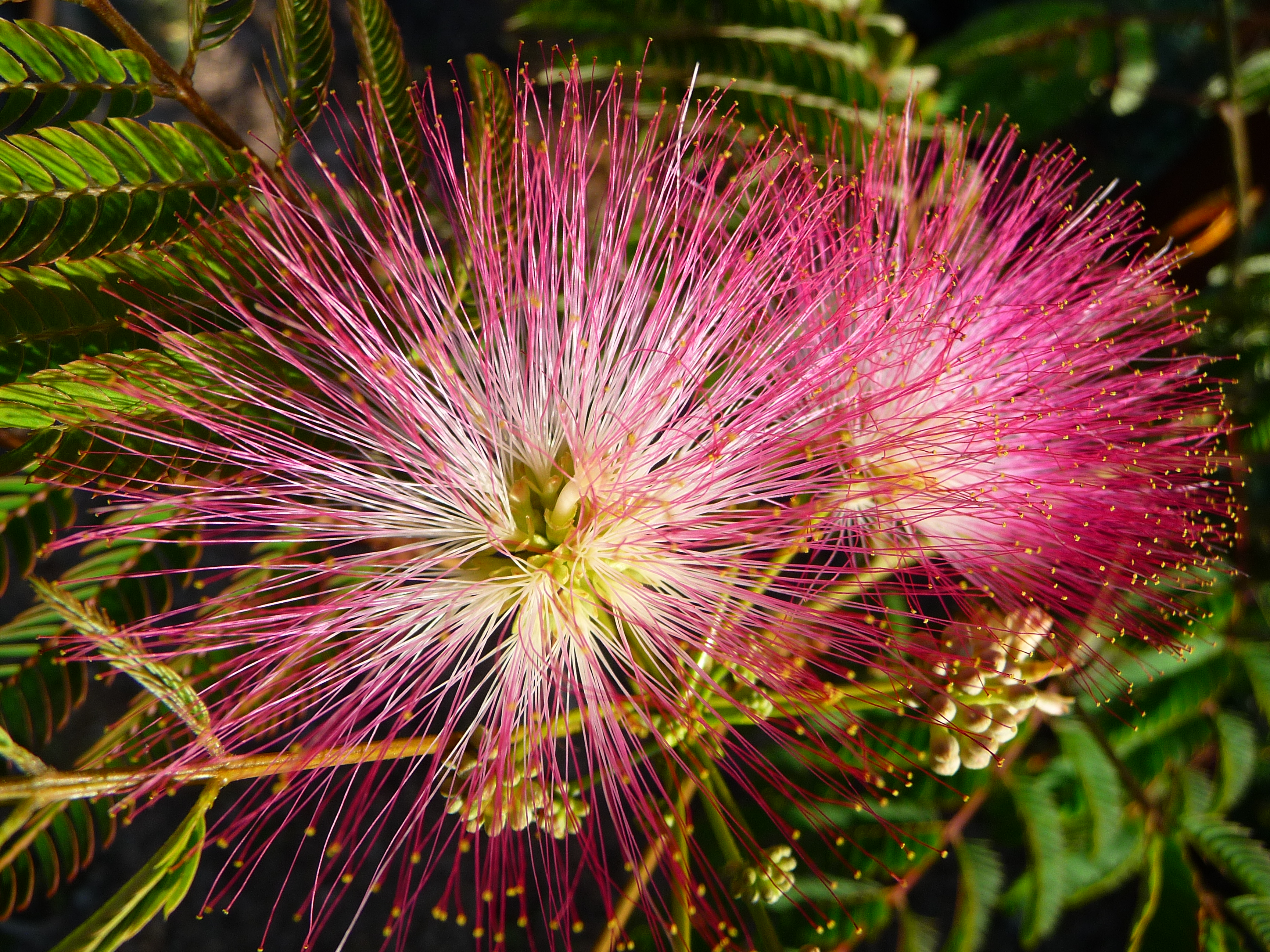 Blüte einer Albizia julibrissin